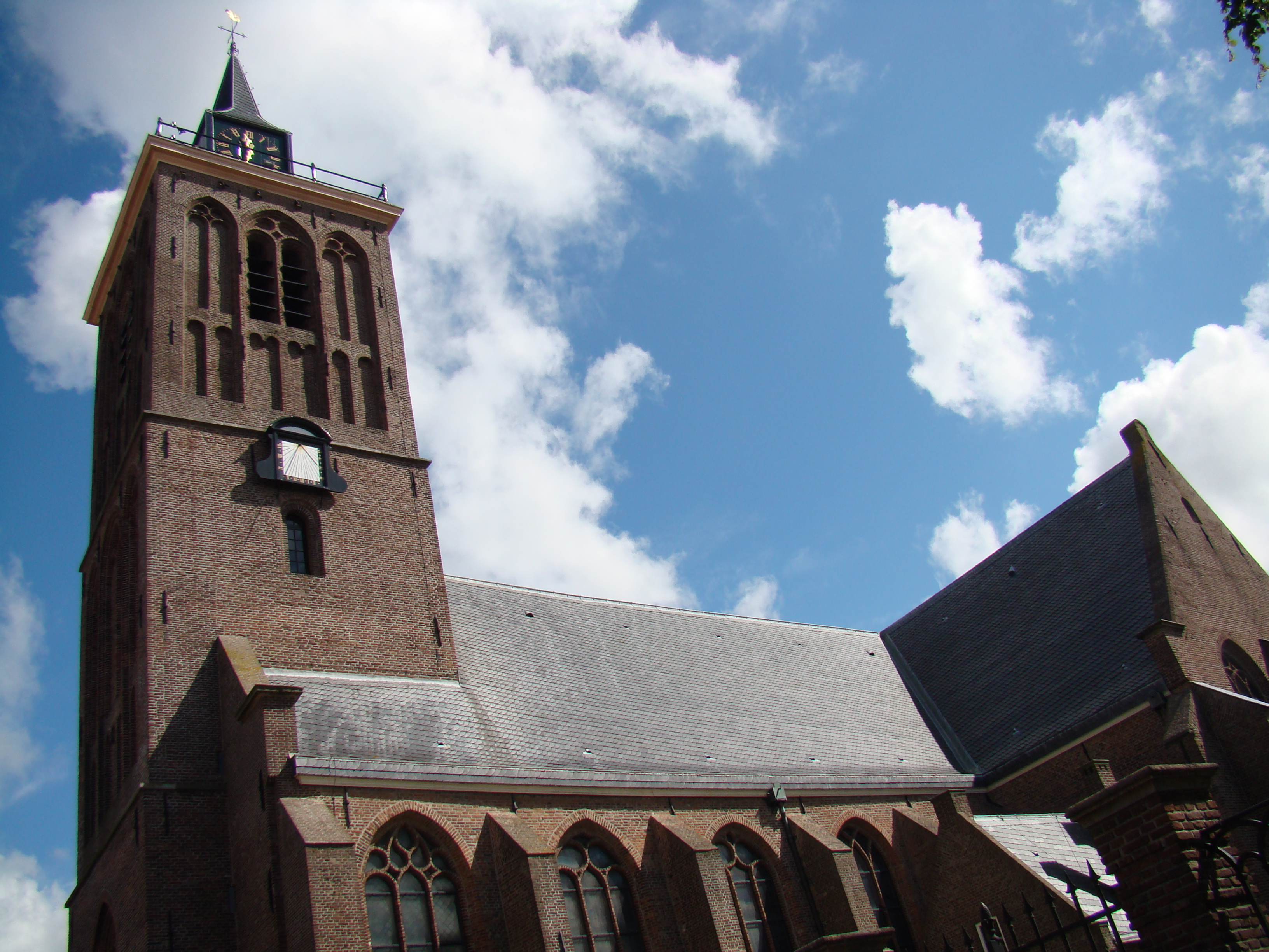 Rijksmonumenten in De Rijp, Monumental buildings in De Rijp, Netherlands